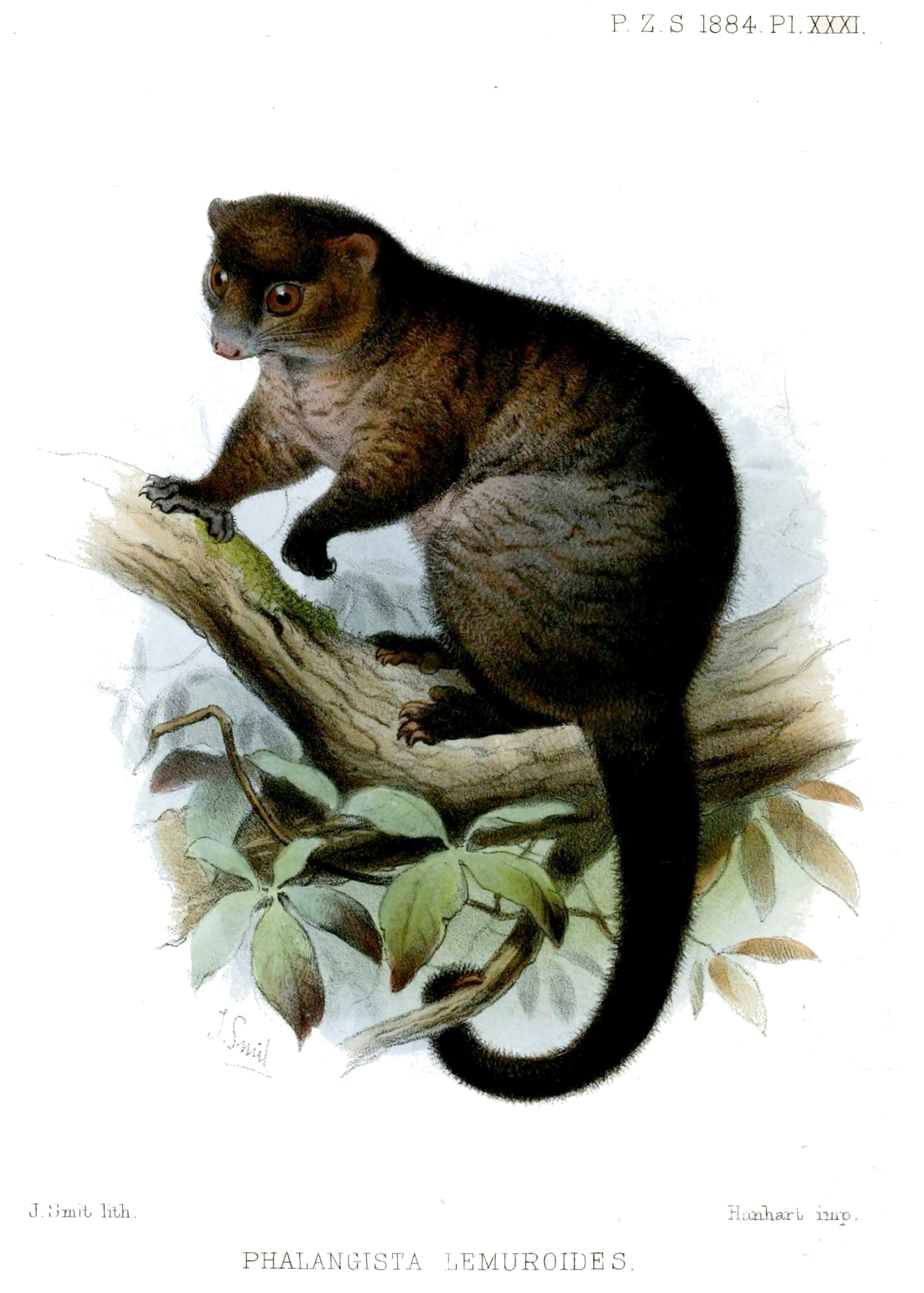 Phalangista lemuroides = Hemibelideus lemuroides